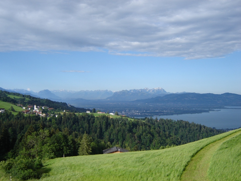 Name: Eichenberg über dem Bodensee (Original text: Blick von Lutzenreuthe (Ortsteil Eichenbrg) nach Eichenberg über dem Bodensee. Im Hintergrund die schweizer Berge mit dem Säntis.)